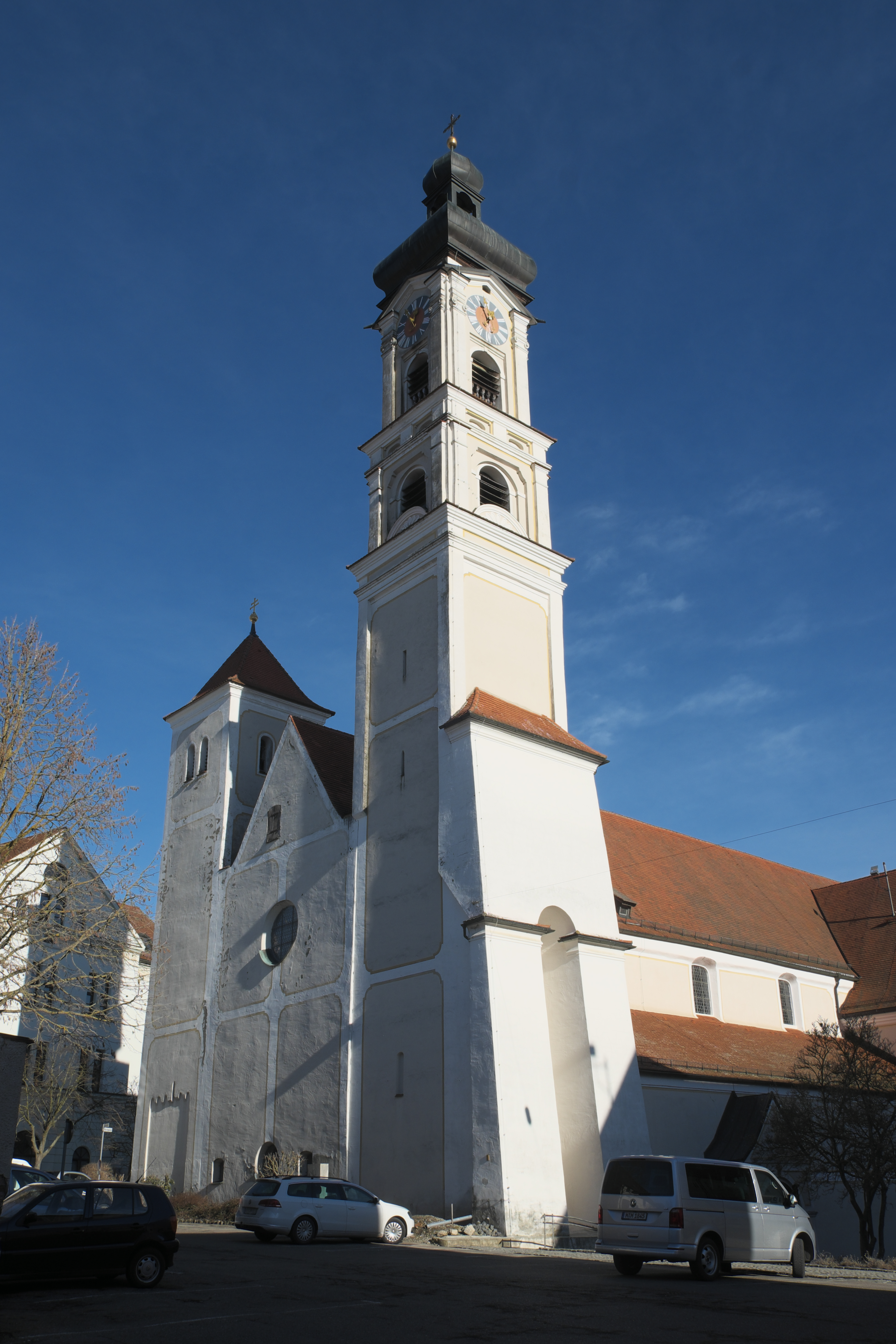 Katholische Pfarrkirche St. Emmeram, ehemalige Benediktinerinnen-Klosterkirche Mariä Himmelfahrt, in Geisenfeld im Landkreis Pfaffenhofen an der Ilm (Bayern/Deutschland)